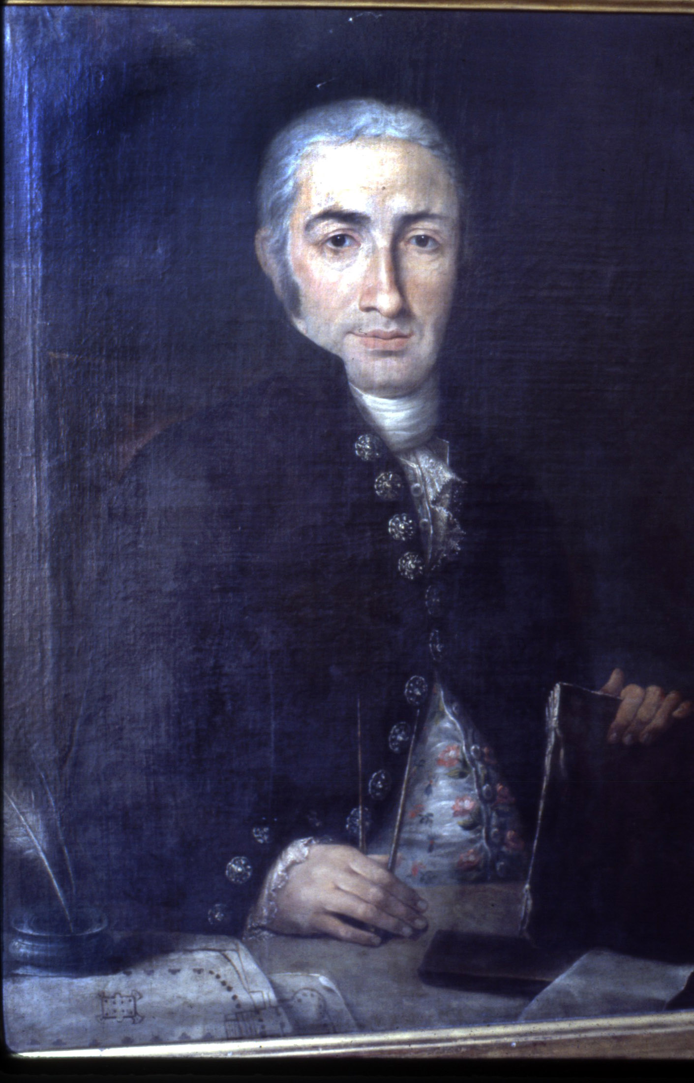 L'arquitecte Joan Soler Faneca autor de les traces del palau Marc de Reus, de Barcelona. Retrat conservat a l'ETSAB. (Arranz / Fuguet, 1987, p. 113)